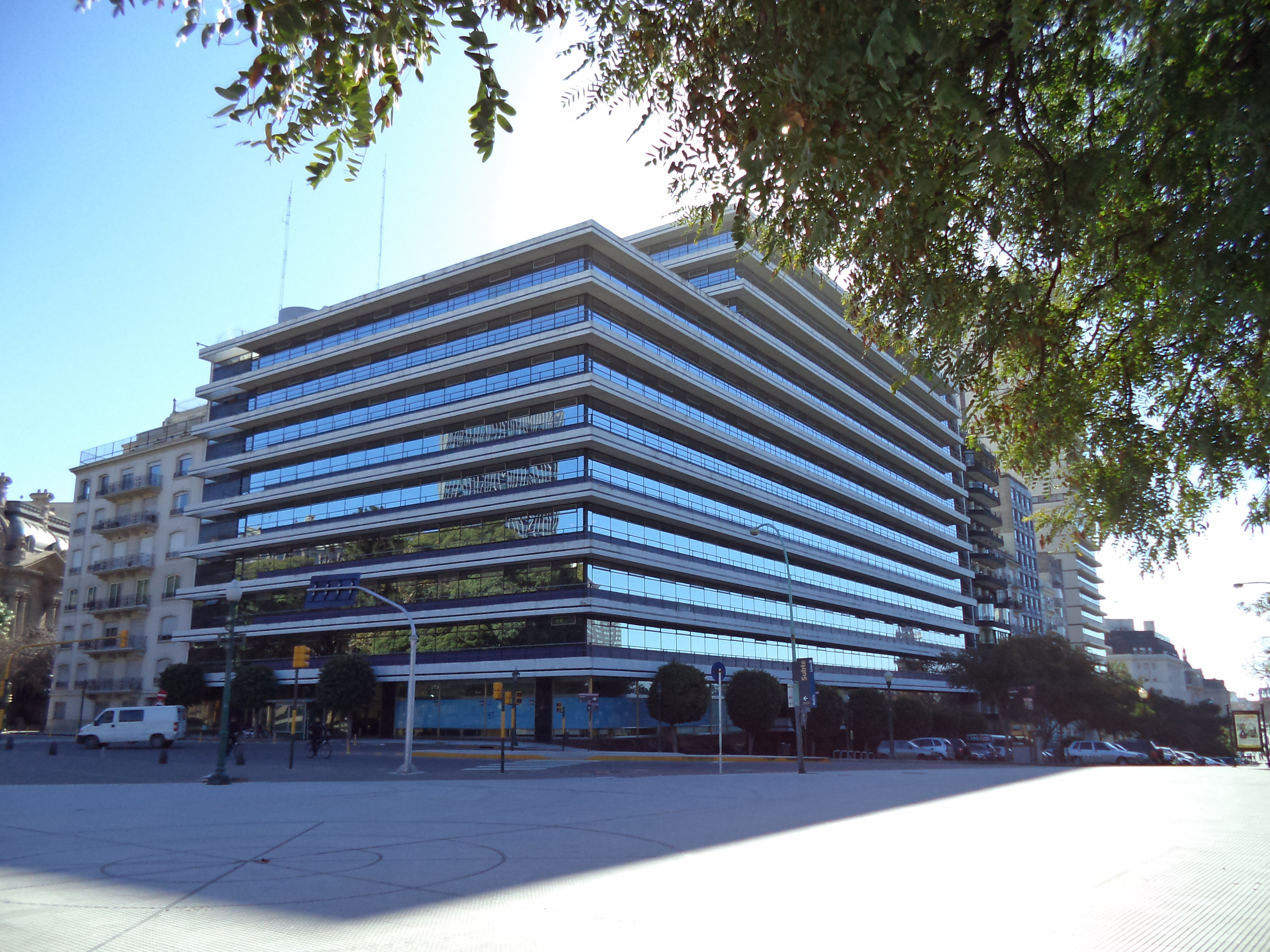 Edificio de oficinas en Maipú y Arenales, sede de American Express en Buenos Aires.